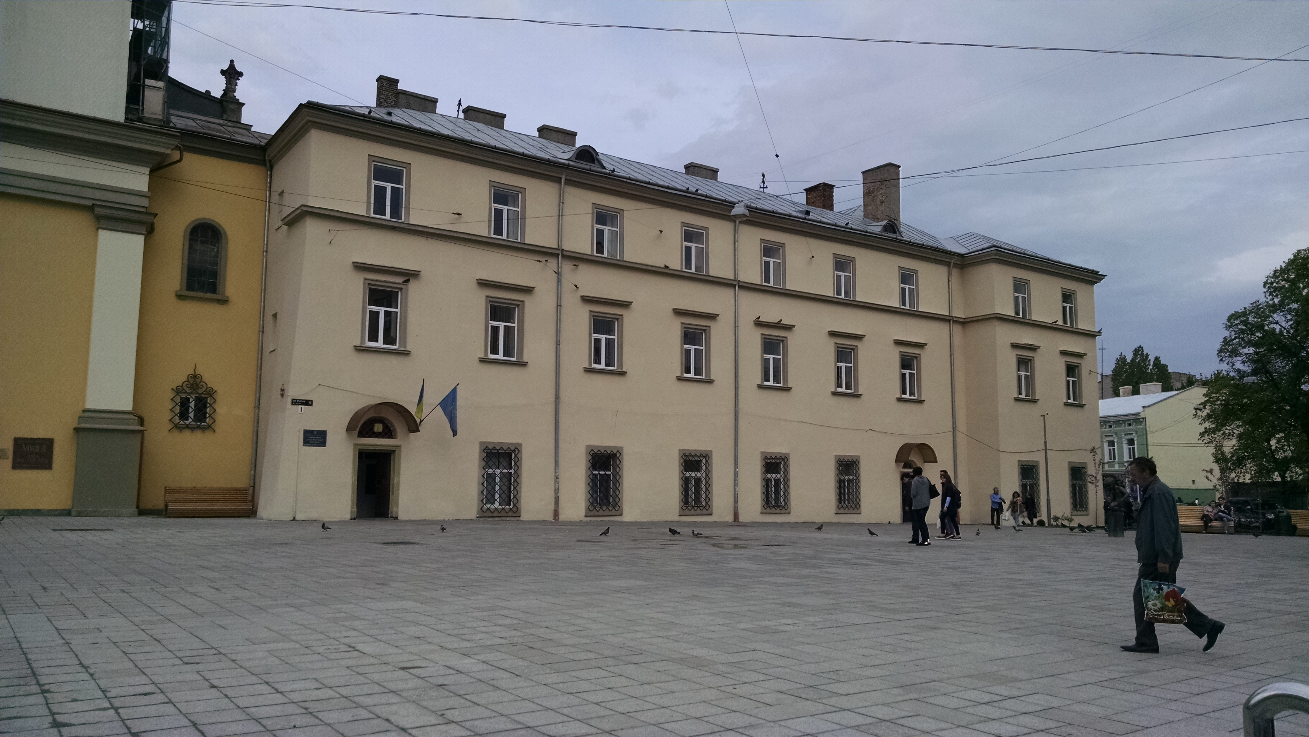 ЛПК УАД навчальний корпус, пл. Митна, 1